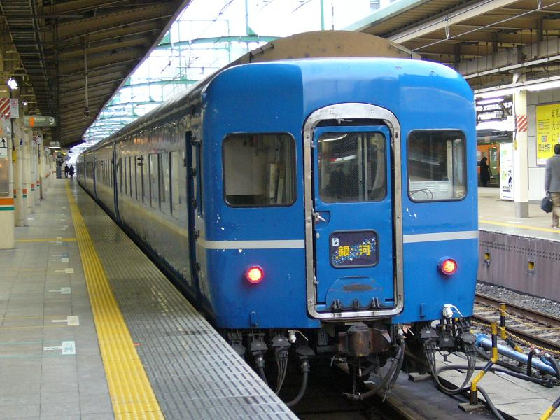 形式 オハネフ25 JR西日本宮原運転所所属 銀河号・日本海号用 2006年2月27日 東京駅にて撮影